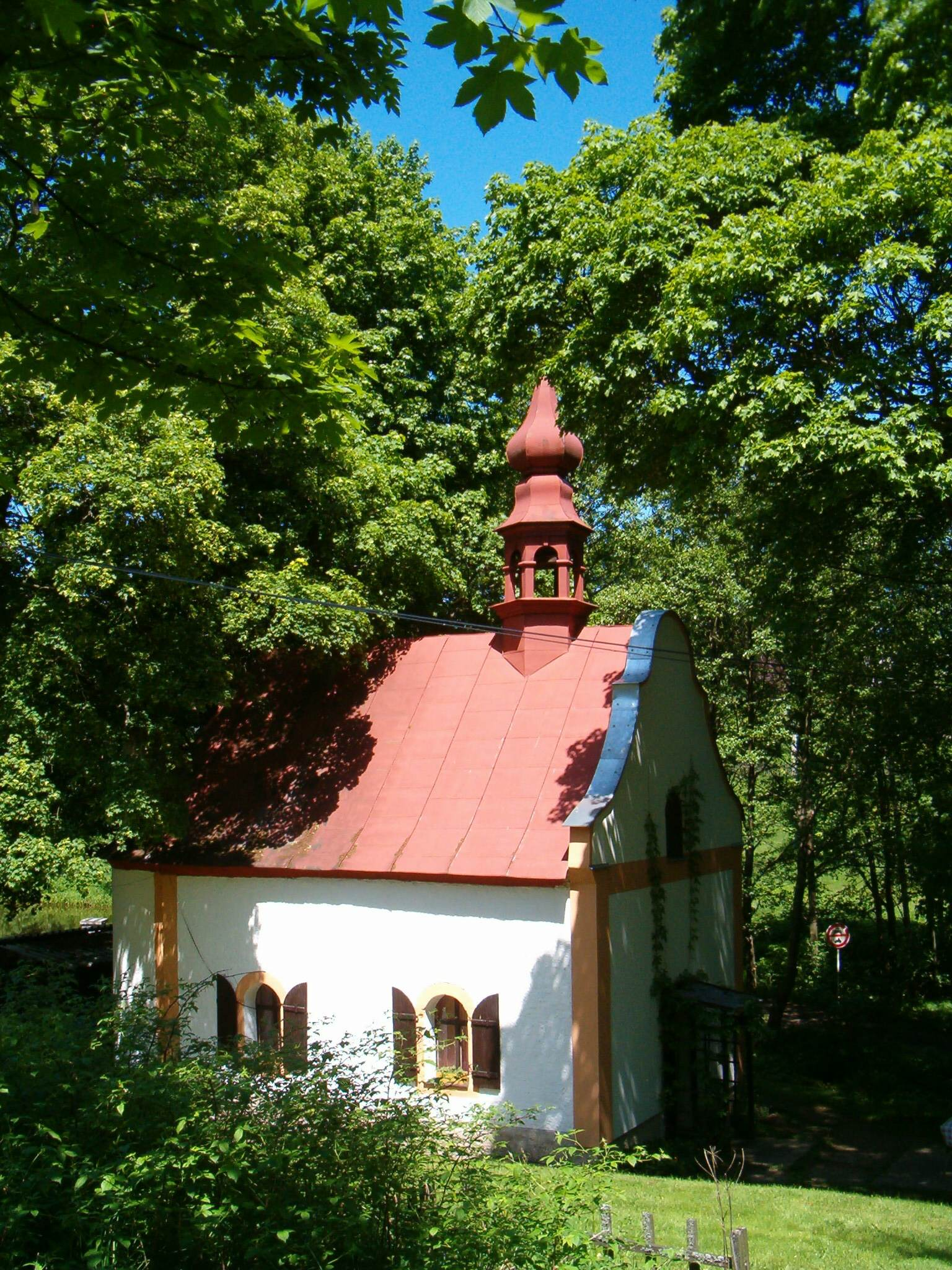 Kaplička ve Vítěněvsi